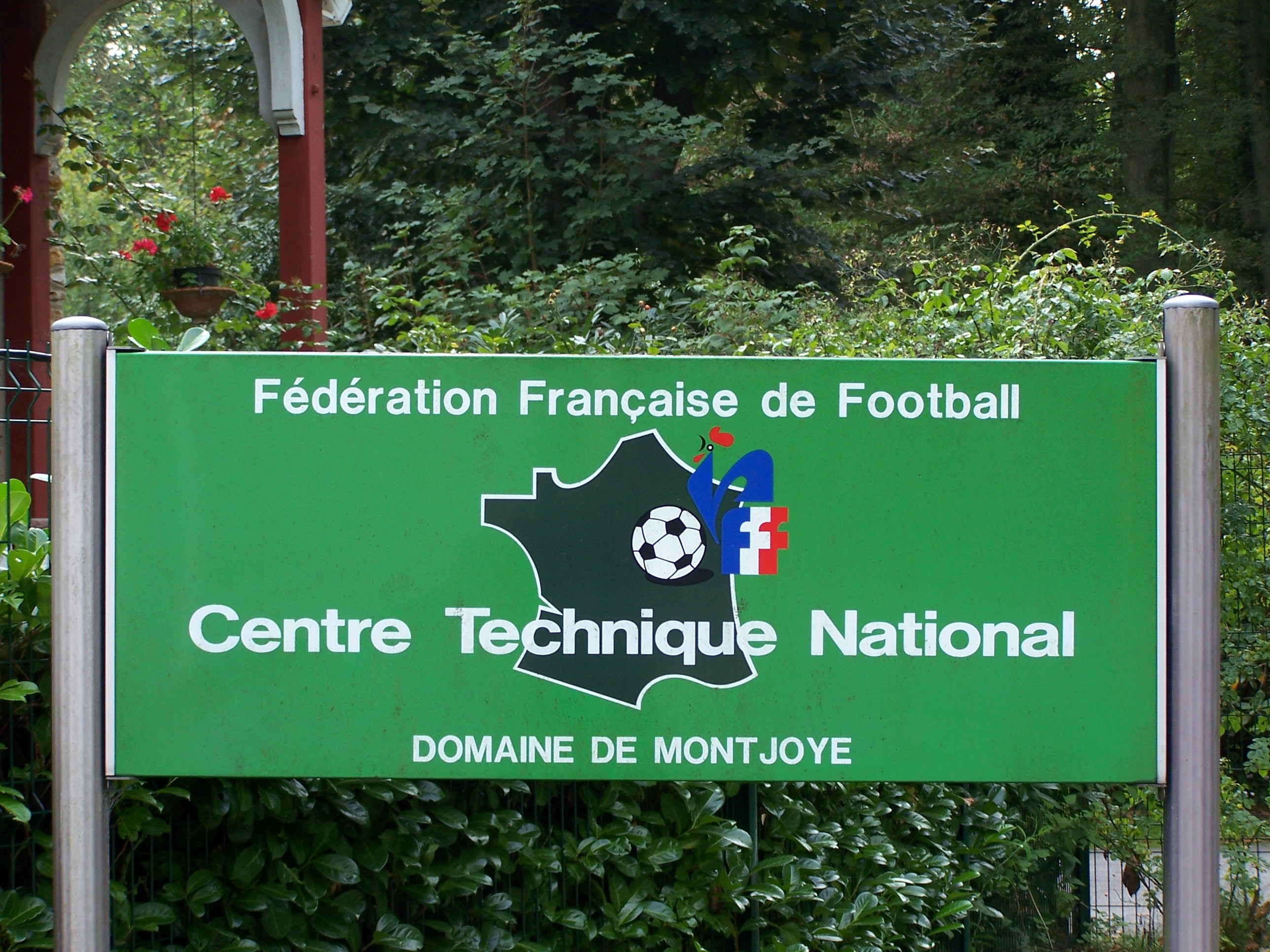 Panneau FFF à l'entrée du domaine de Montjoye à Clairefontaine-en-Yvelines (Yvelines, France)